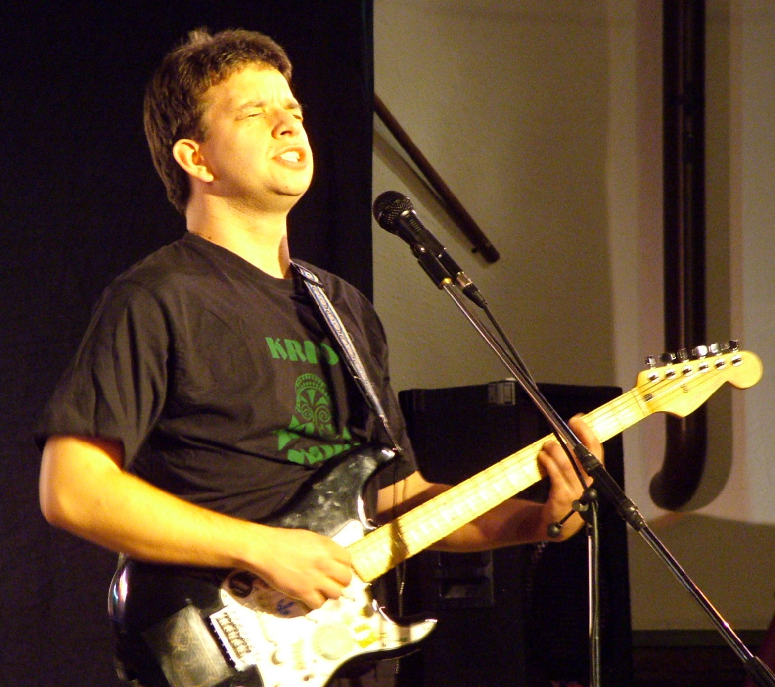 Robert von dem Borne